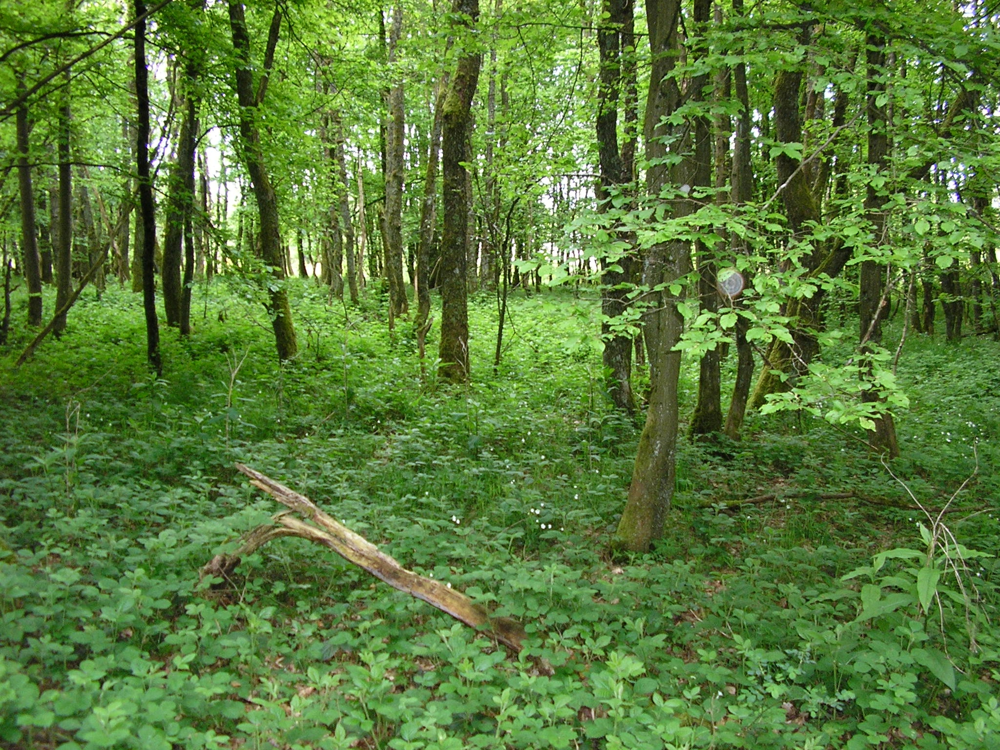 Eichenniederwald zur Gewinnung von Lohe; „Lohhecken“ auf dem Penzebierg, Gemeinde Kiischpelt, Luxemburg